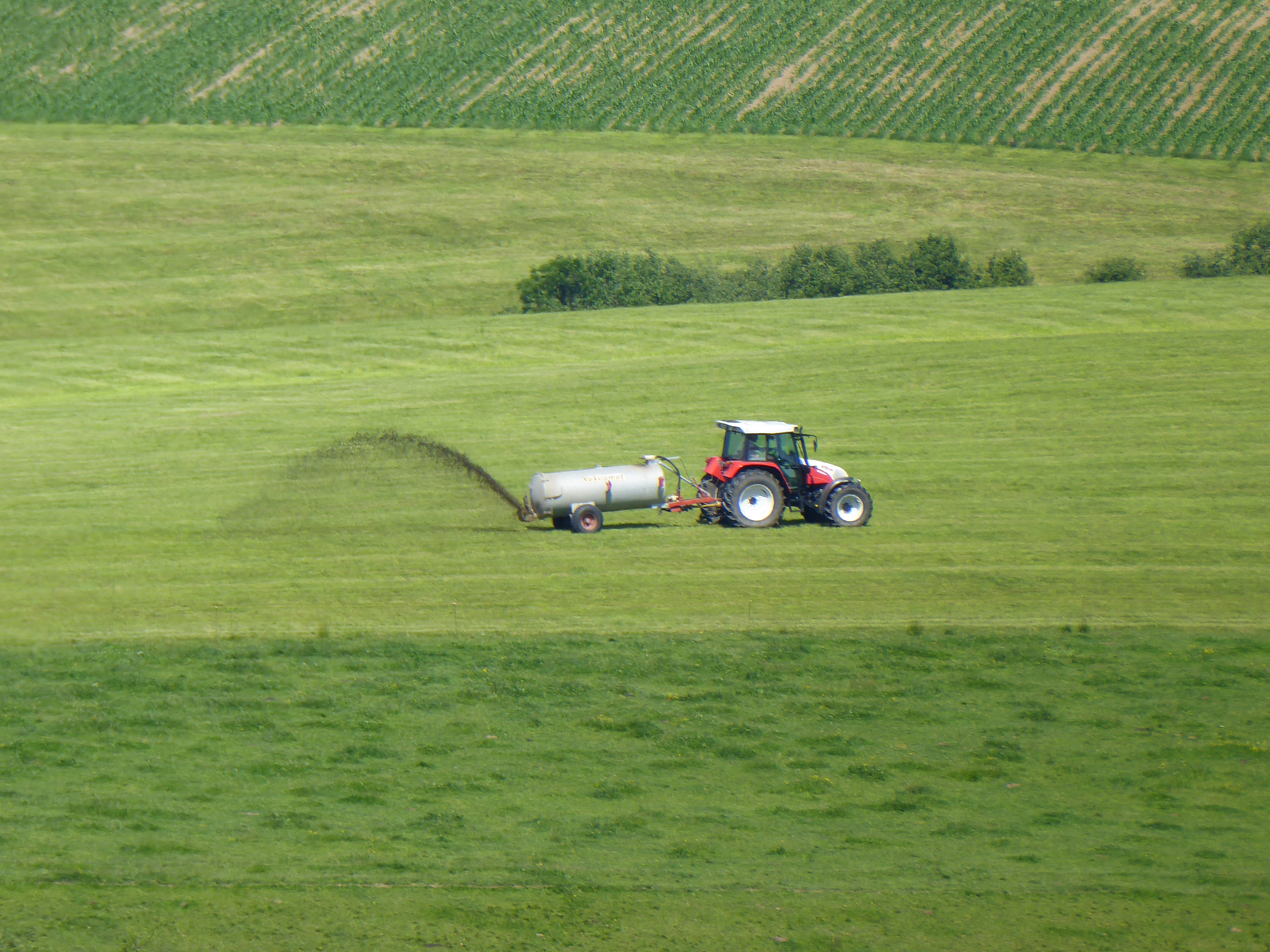 In Edling, Trofaiach, ist ein Landwirt damit beschäftigt, den Dung aus dem Kuhstall ("Mist") als Dünger für eine Wiese auszufahren.